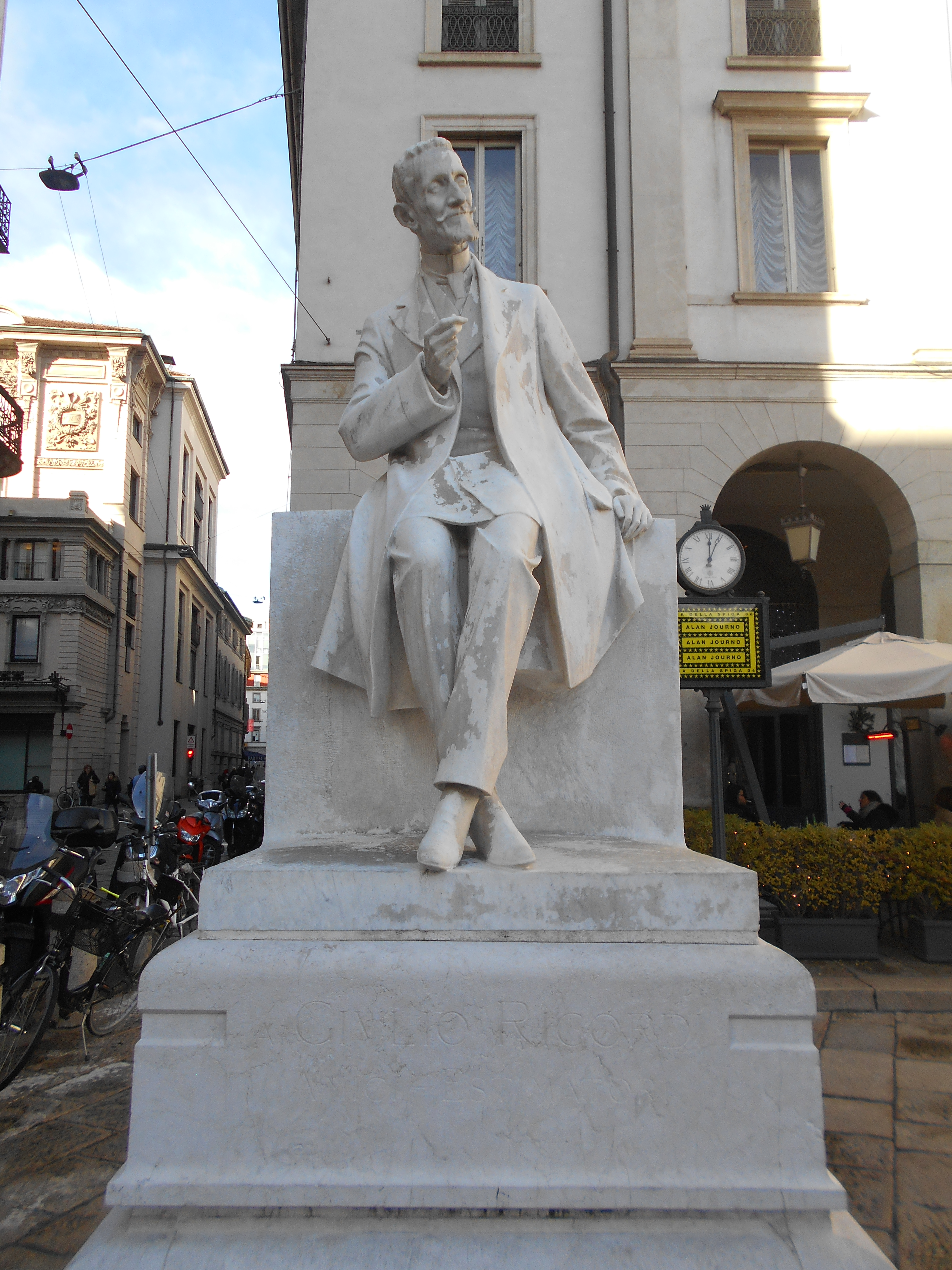 Monumento a Giulio Ricordi di Luigi Secchi in piazza alla Scala, Milano